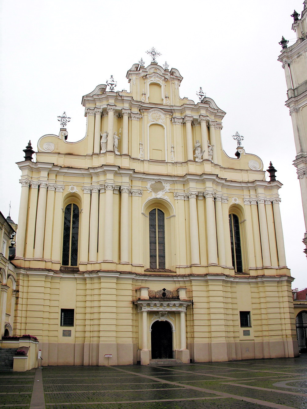 Vilniaus universitetas Šv. Jono bažnyčios pagrindinis fasadas Foto: Algirdas, 2006 m. rugpjūčio 8 d., Lietuva